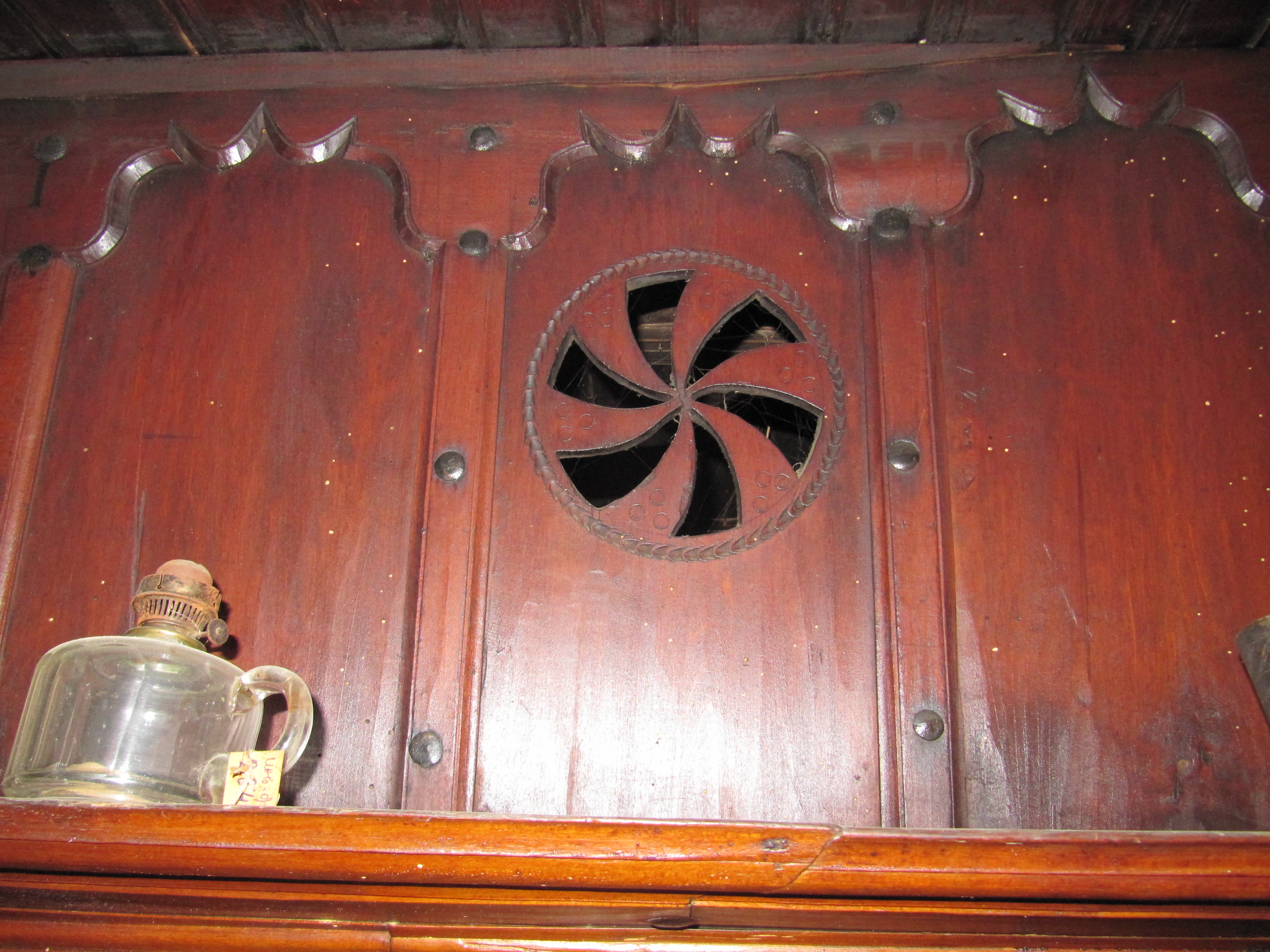 Simboli i Diellit si hyjni te ilirët dhe që gjendet edhe sot te shqiptarët, sidomos në trojet veriore shqiptare.